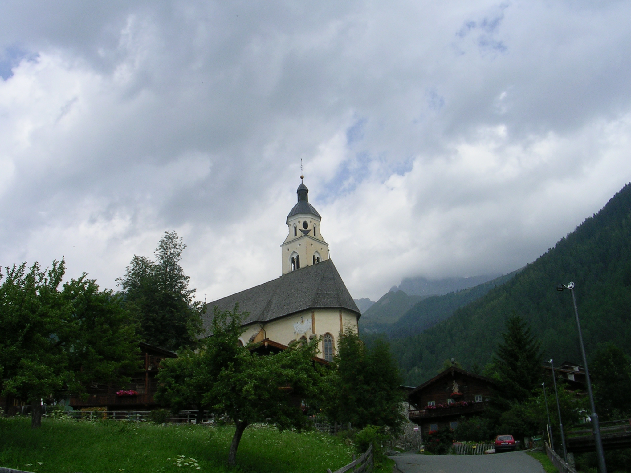 Virgen